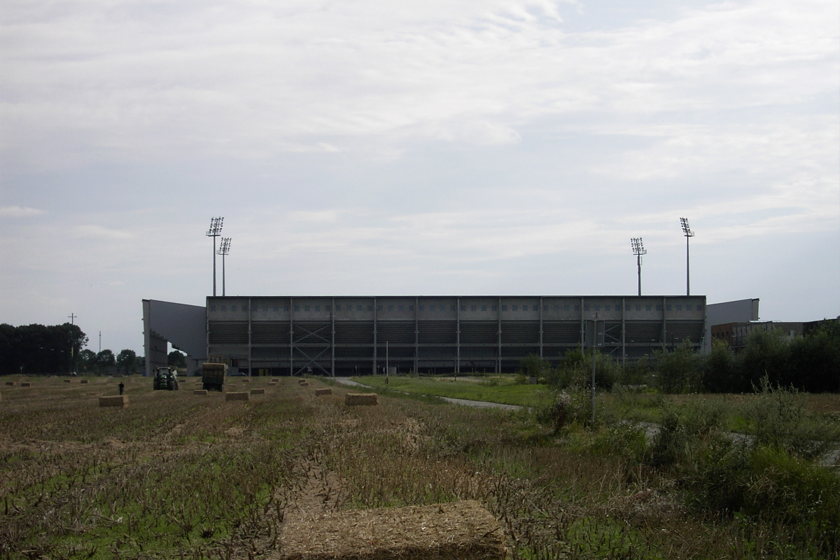 Rapsstroh pressen mit John Deere Traktor, Claas Quadrant, im Hintergrund das Stadion von Sittard, Limburg, Niederlande; Trendwork Arena